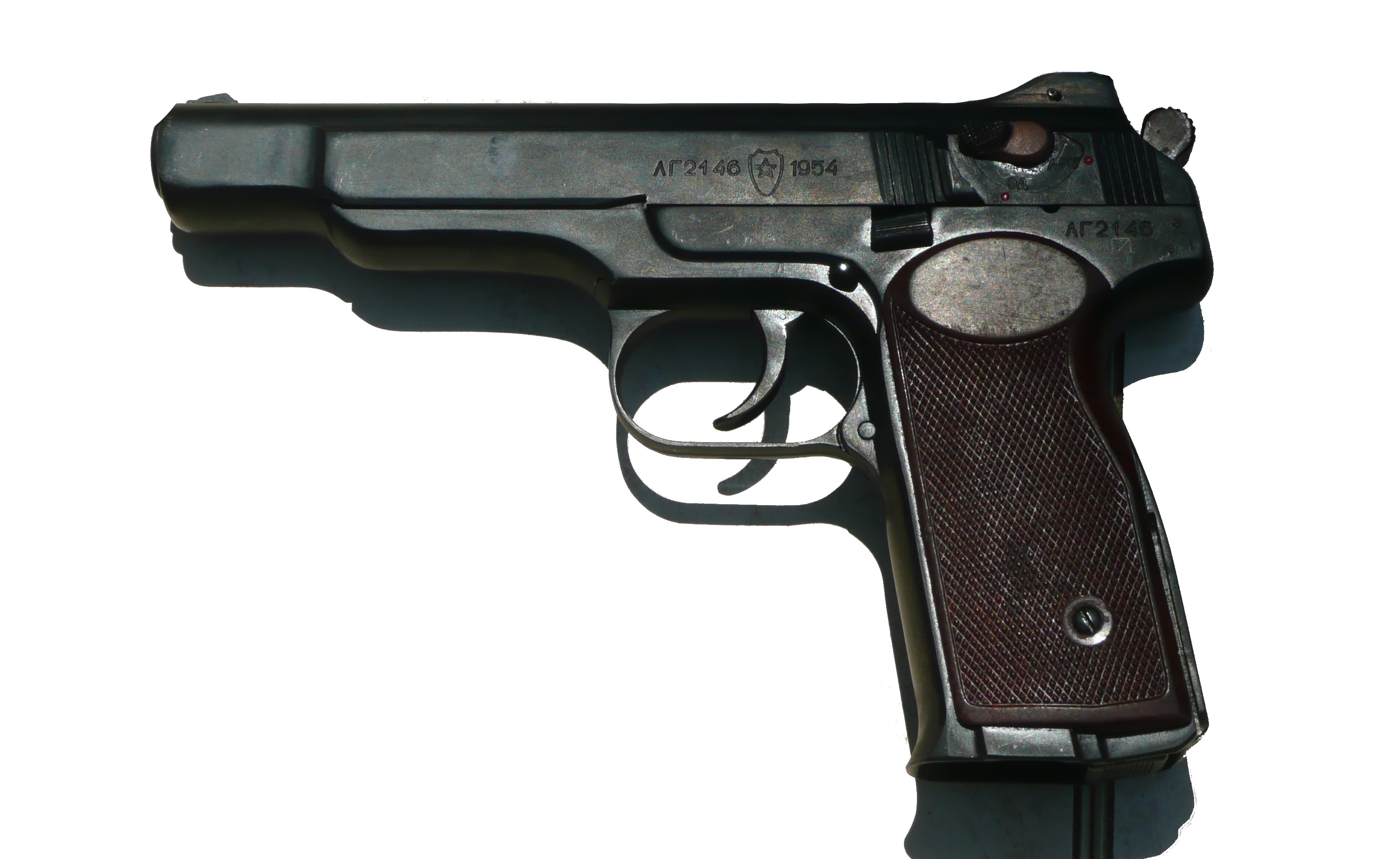 Stechkin APS, Russian Machine pistol